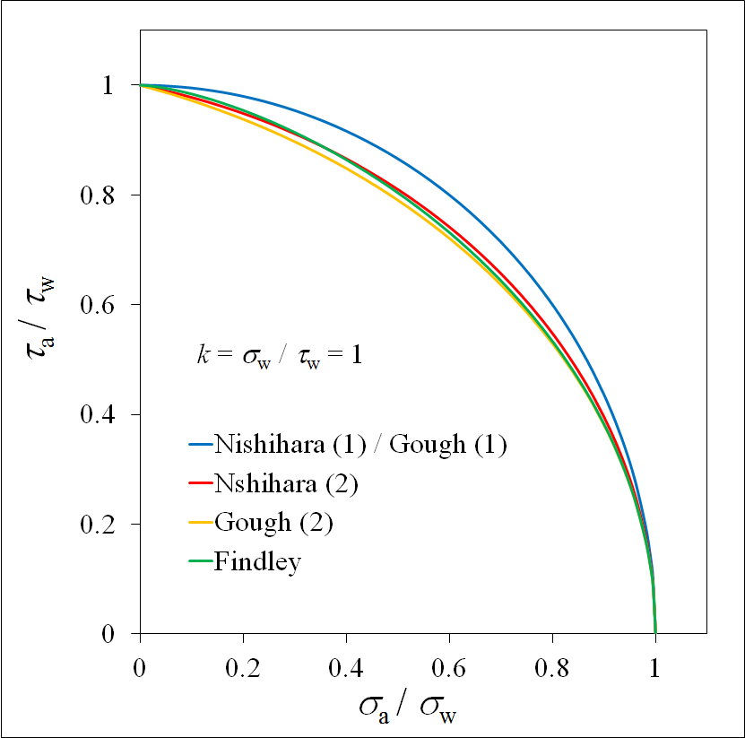 Nishihara(1) / Gough(1): ( σ a σ w ) 2 + ( τ a τ w ) 2 = 1 {\displaystyle \left({\frac {\sigma _{a {\sigma _{w }\right)^{2}+\left({\frac {\tau _{a {\tau _{w }\right)^{2}=1} Nishihara(2): ( τ a τ w ) 2 + ( σ a σ w ) 2 ( k 2 2 − 1 2 ) + ( σ a σ w ) 2 ( 3 2 − k 2 2 ) = 1 {\displaystyle \left({\frac {\tau _{a {\tau _{w }\right)^{2}+\left({\frac {\sigma _{a {\sigma _{w }\right)^{2}\left({\frac {k^{2 {2 -{\frac {1}{2 \right)+\left({\frac {\sigma _{a {\sigma _{w }\right)^{2}\left({\frac {3}{2 -{\frac {k^{2 {2 \right)=1} Gough(2): ( τ a τ w ) 2 + ( σ a σ w ) 2 ( k − 1 ) + ( σ a σ w ) 2 ( 2 − k ) = 1 {\displaystyle \left({\frac {\tau _{a {\tau _{w }\right)^{2}+\left({\frac {\sigma _{a {\sigma _{w }\right)^{2}(k-1)+\left({\frac {\sigma _{a {\sigma _{w }\right)^{2}(2-k)=1} Findley: ( σ a σ w ) k + ( τ a τ w ) 2 = 1 {\displaystyle \left({\frac {\sigma _{a {\sigma _{w }\right)^{k}+\left({\frac {\tau _{a {\tau _{w }\right)^{2}=1} ただし k = σ w / τ w = 1 {\displaystyle k=\sigma _{w}/\tau _{w}=1} のとき